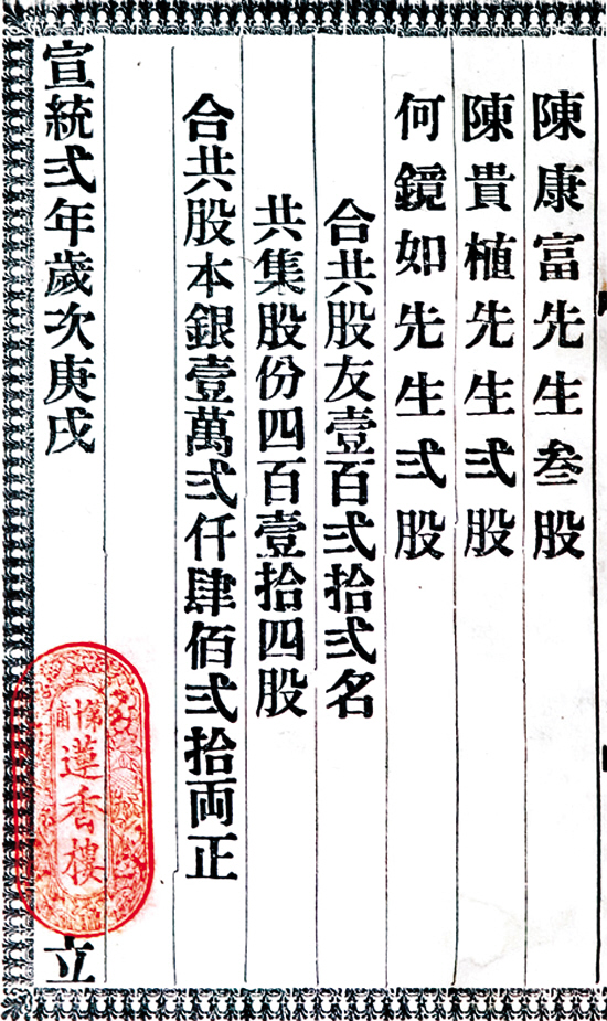 第十甫蓮香樓宣統二年股東簿